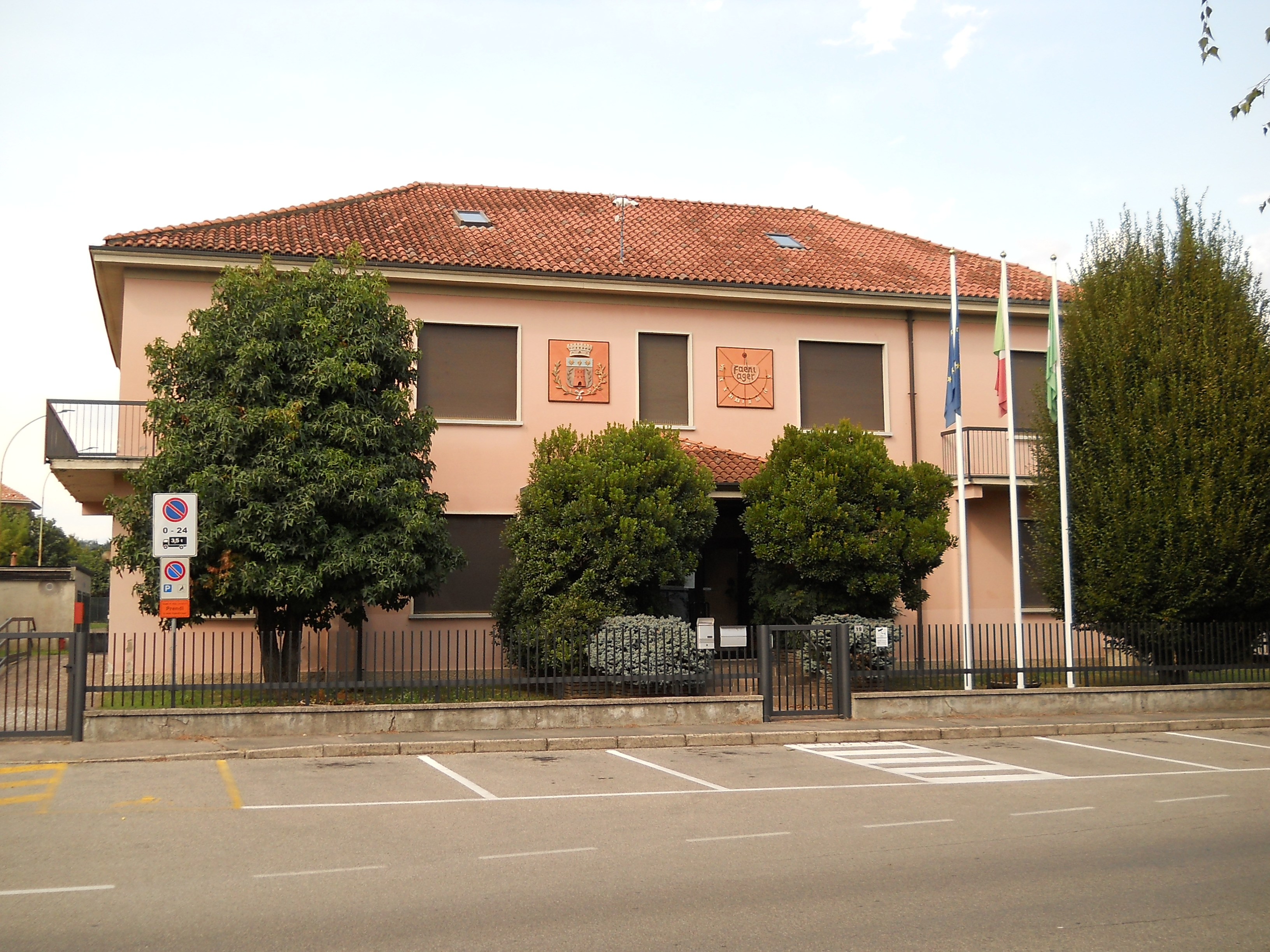 Foto del municipio di Fenegrò, visto dall'ingresso principale, situato su via Colombo.